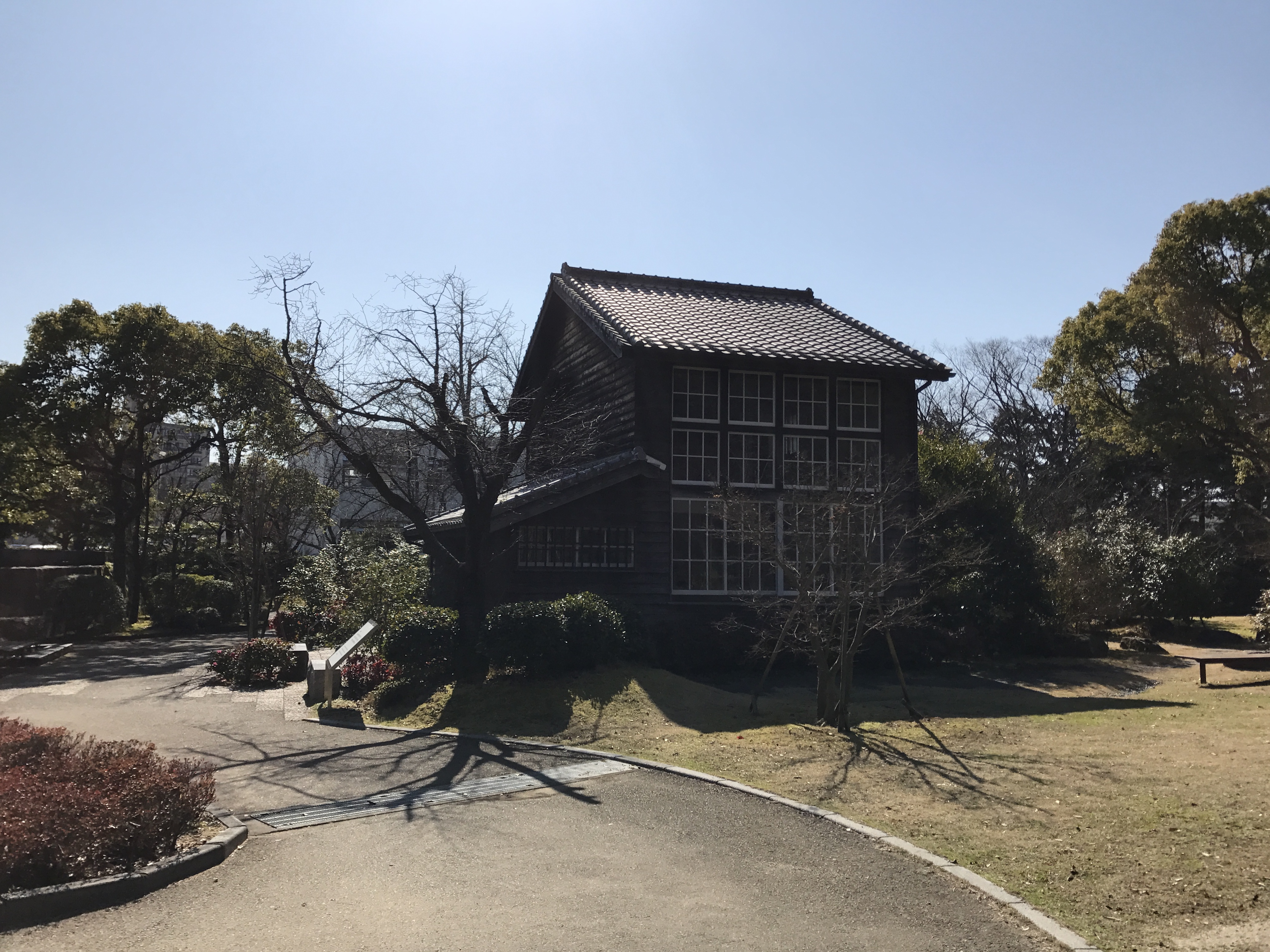 石橋文化センターにある坂本繁二郎旧アトリエ